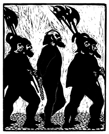 Print